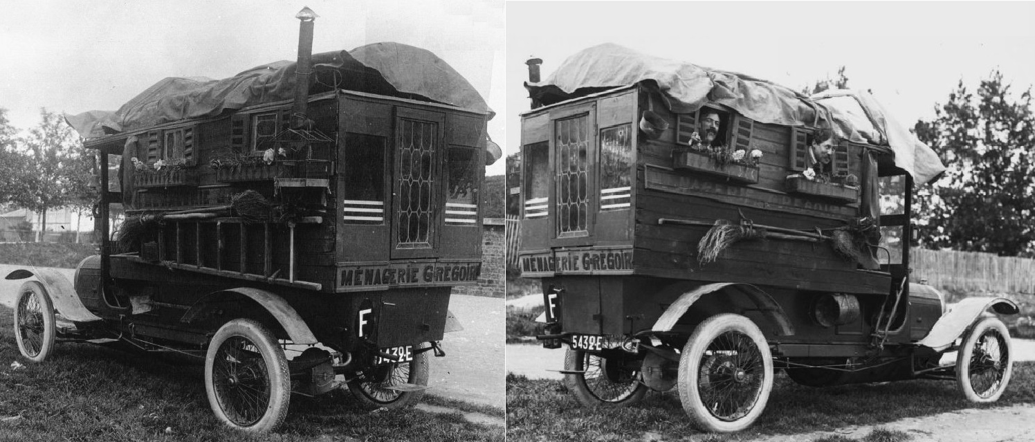 Le 21 septembre 1912, sur une roulotte Grégoire -dite La Ménagerie Grégoire-, Jean Porporato, avec 11 passagers à bord -dont Mr et Mme Picard-, remporte le rallye de régularité Posen (Pologne)-San Sébastian (Espagne), le véhicule obtenant aussi le Prix de l'Élégance, notamment avec ses jardinières de fleurs en balconnets (3 500 kilomètres parcourus en 7 jours, 2e Hispano-Suiza et 3e Berliet).